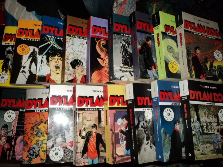 Alcuni Oscar Mondadori su Dylan Dog